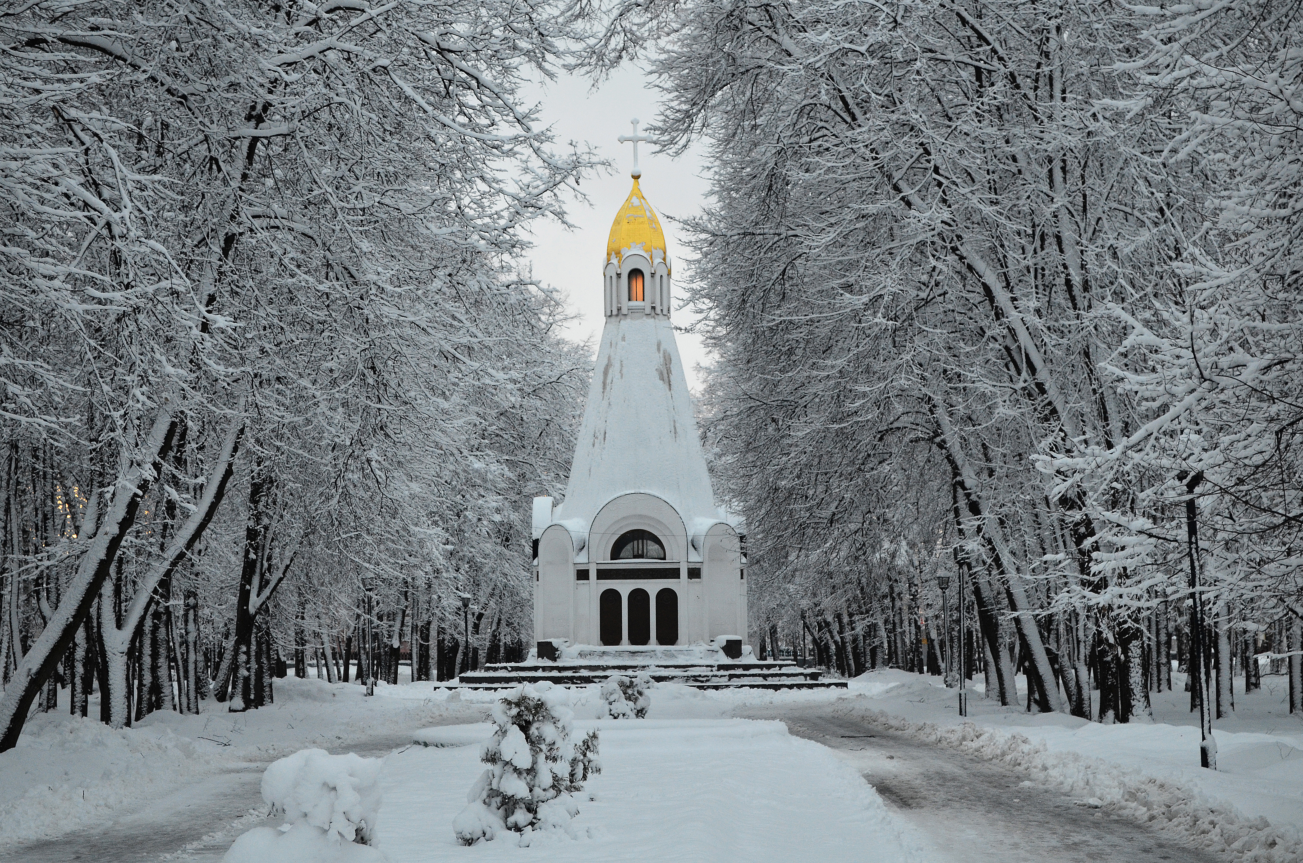 Рязань.Часовня в честь 900-летия основания города.1995.